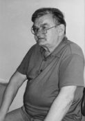 Portrét Ludvíka Švába